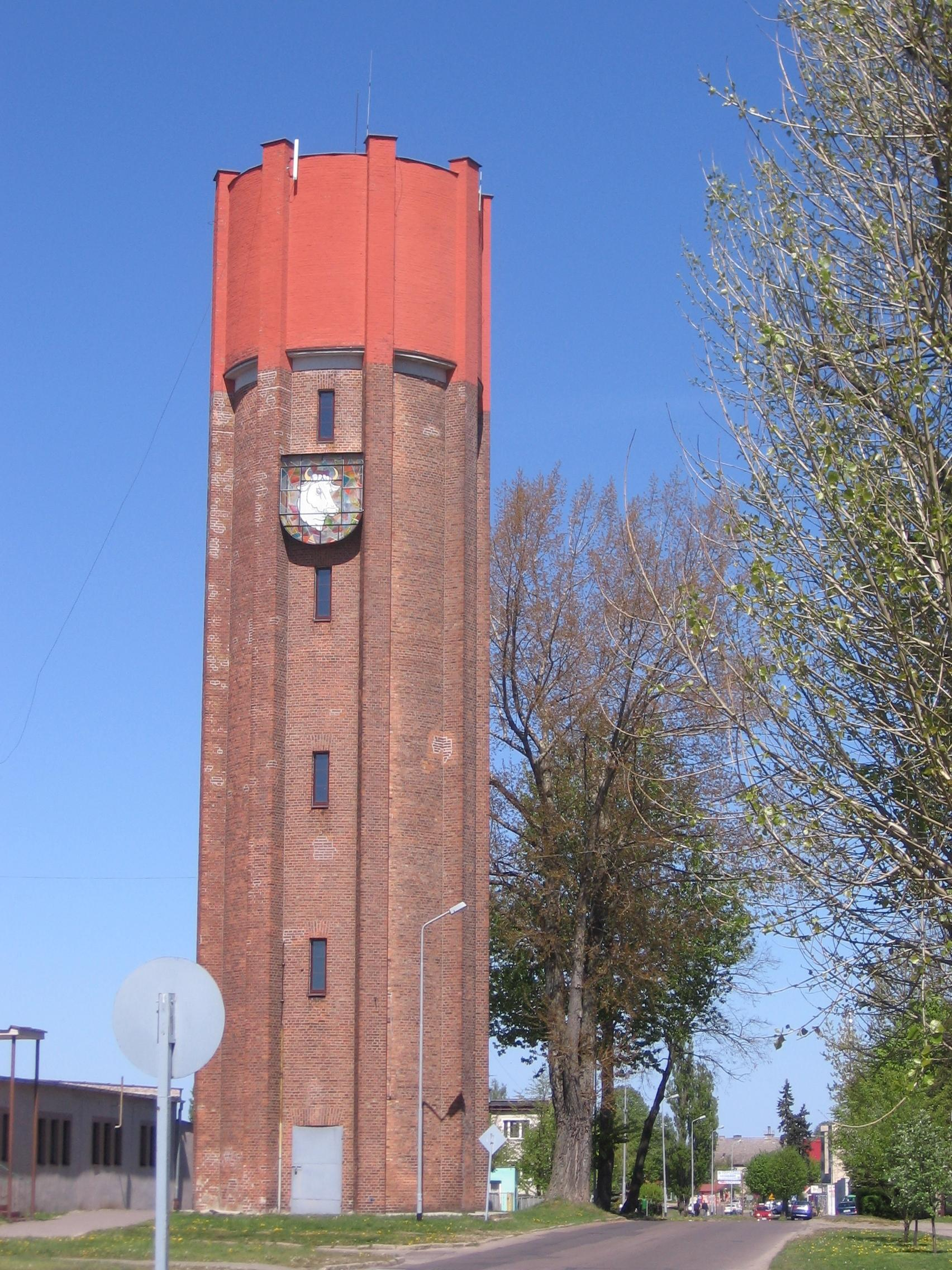 Wieża ciśnień w Człuchowie — Brick water tower in Człuchów, Pomeranian Voivodeship, Poland